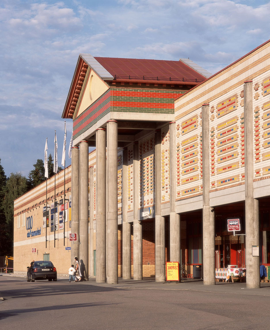 Centrum Handlowe Vinterbro w Norwegii